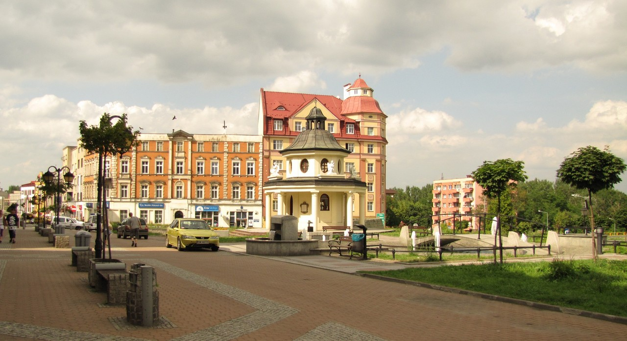 FRAGMENT STAREGO MIASTA.